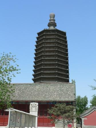 天宁寺塔 拍摄